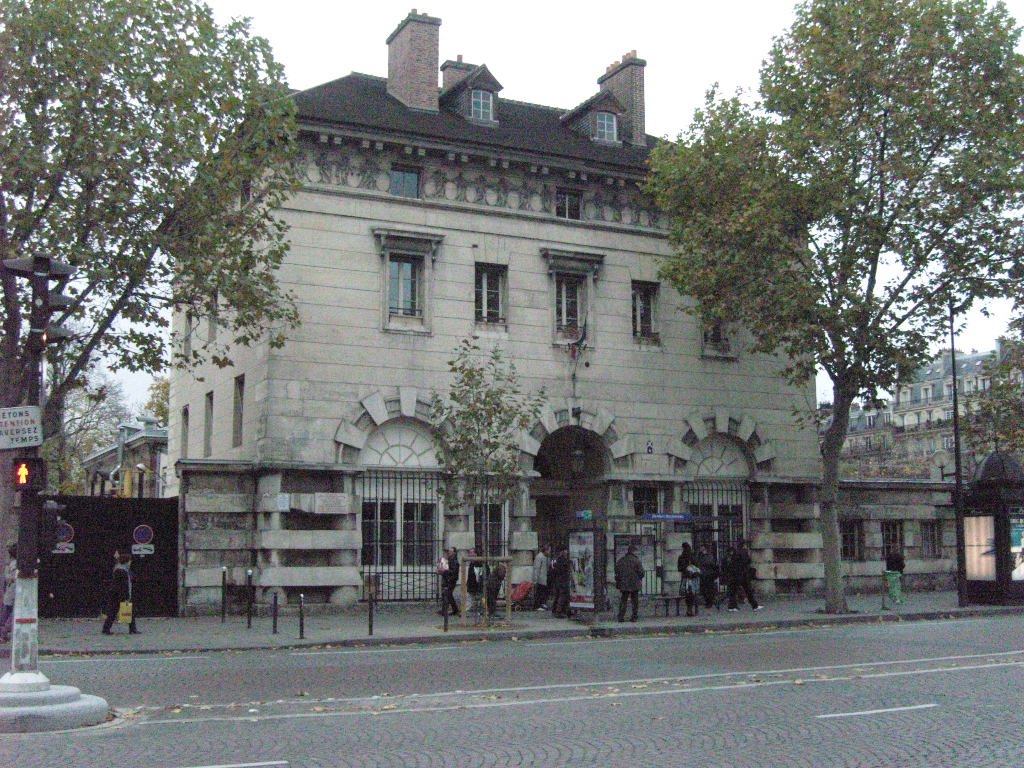 Paris 14e - place Denfert-Rochereau - pavillon Ledoux ouest.JPG